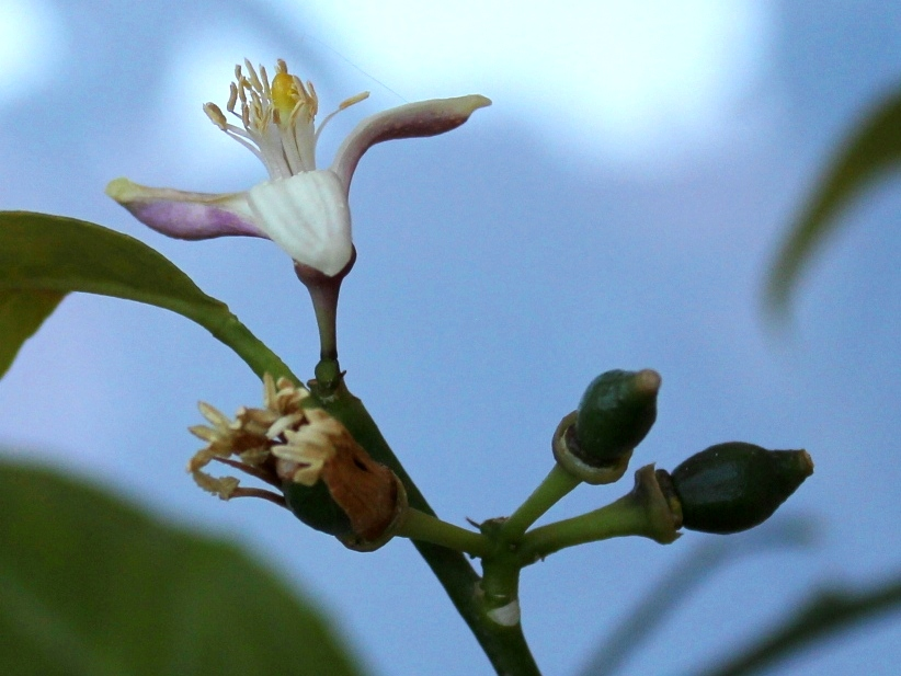 Цветок и завязи культурного лимона